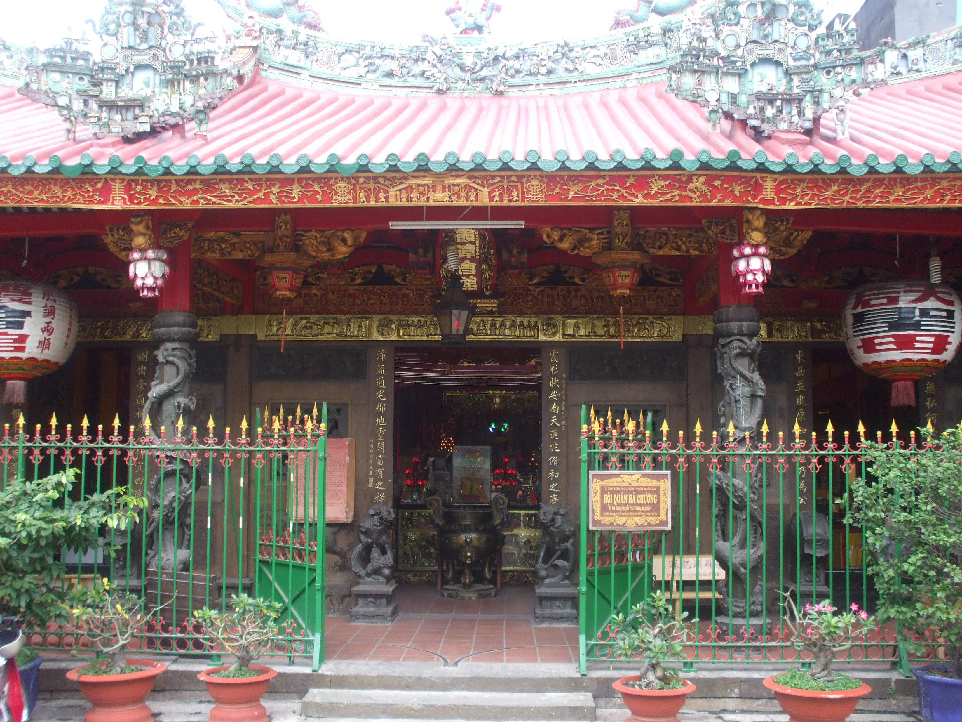 Hội quán Hà Chương, quận 5, Thành phố Hồ Chí Minh.